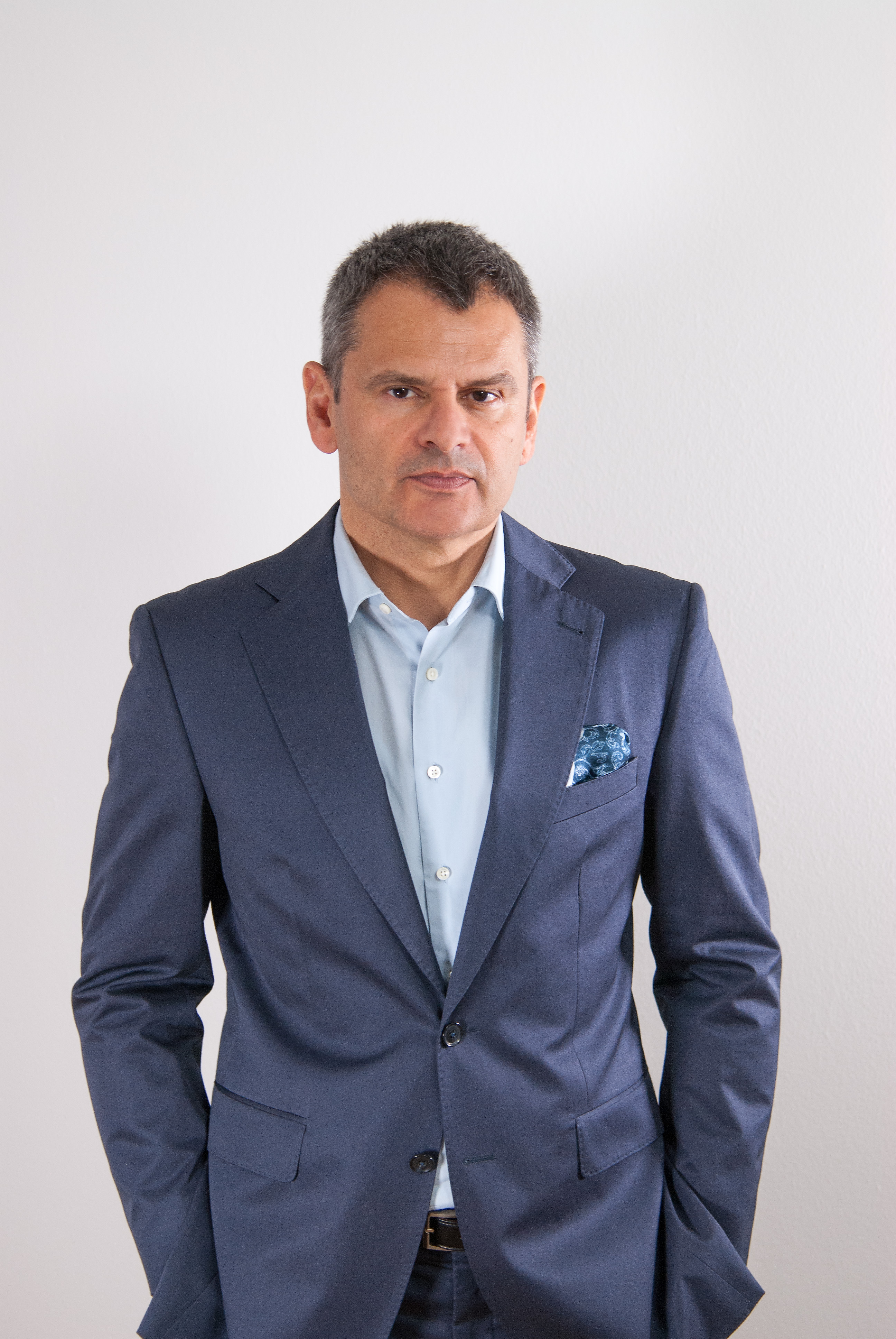 Verleger und Autor Gerdt Fehrle (2017)